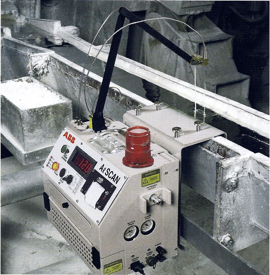 H sensor